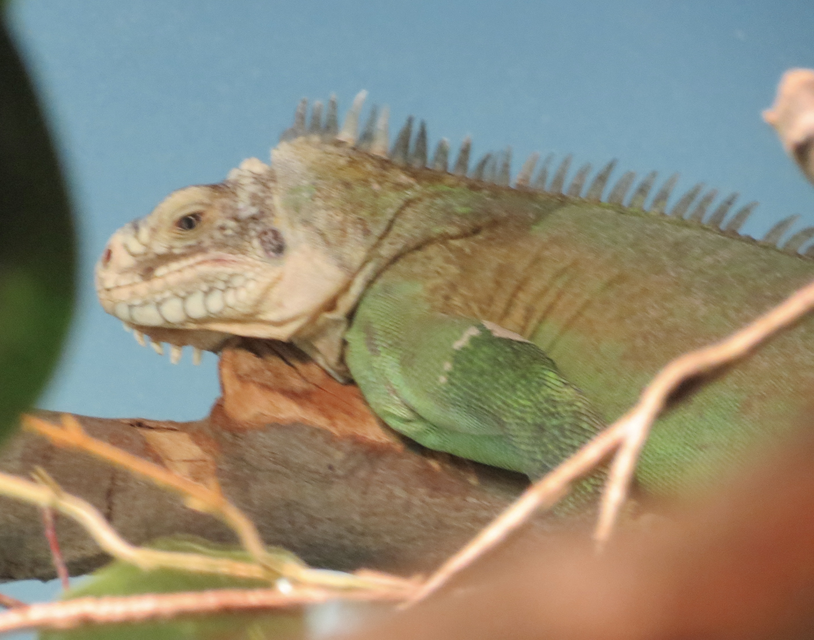 Antiilenleguaan (Iguana Delicatissima) in Blijdorp